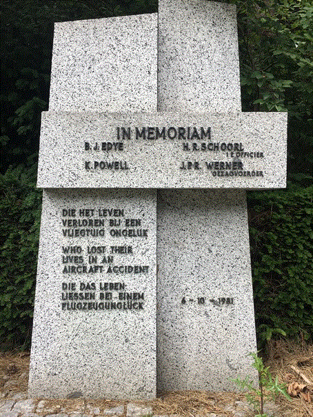 Monument op de De Nieuwe Ooster Bergaafplaats ter nagedachtenis van de vliegramp.